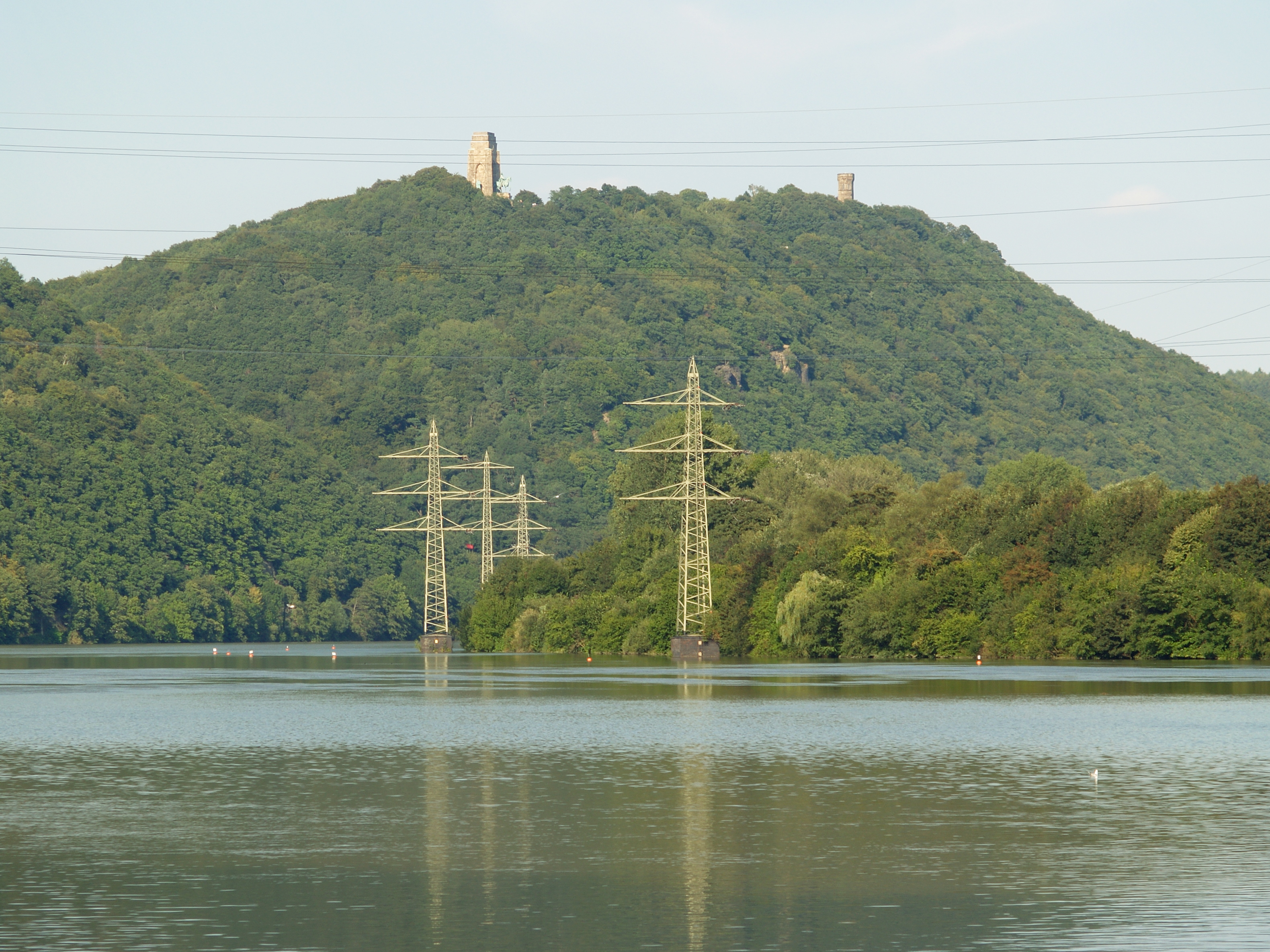 Blick über den Hengsteysee auf den Syberg mit dem Kaiser-Wilhelm-Denkmal und dem Vincketurm, bewaldeter Steilhang mit freien Felskuppen im NSG Ruhrsteilhänge Hohensyburg, rechts Freileitung (Bl. 2307)